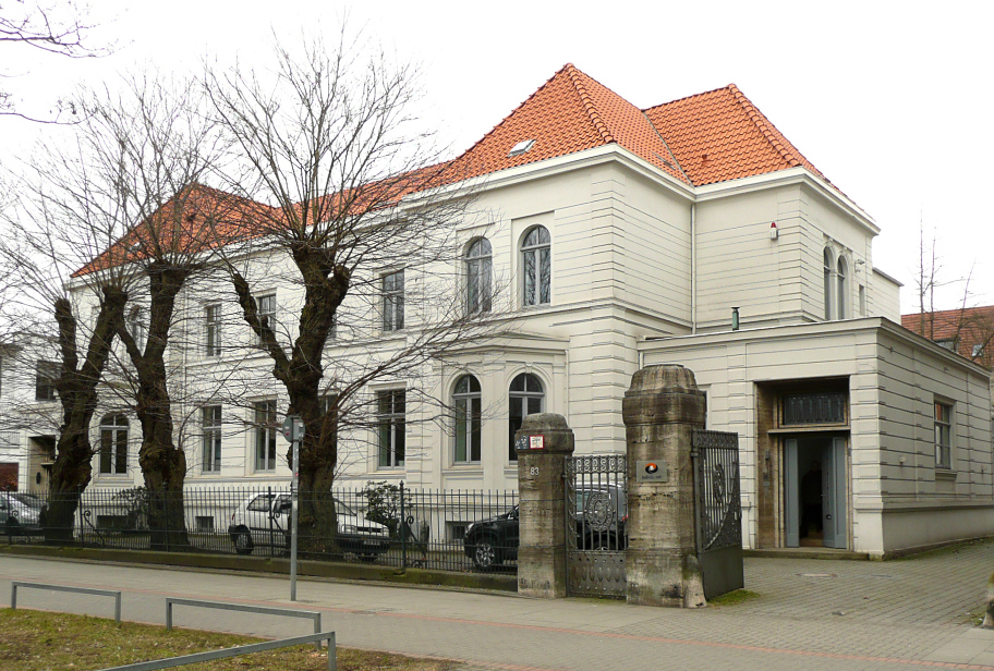 Ahrbergvilla